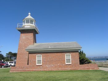 Santa Cruz USA 2004 Latarnia Morska. Zdjęcie własne